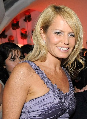 Cecilia Carolina Bolocco Fonck (Santiago de Chile, 19 de mayo de 1965). Es una ex presentadora de televisión chilena. Es célebre por haber sido elegida Miss Universo en 1987. Estuvo casada con el ex presidente argentino Carlos Menem, de quien se divorció en el año 2007.